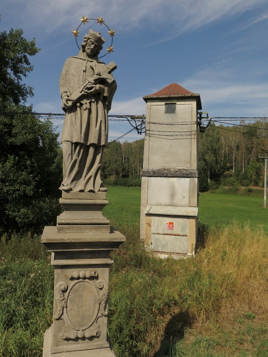 Socha svatého Jana Nepomuckého, na mostě, Třebčice.